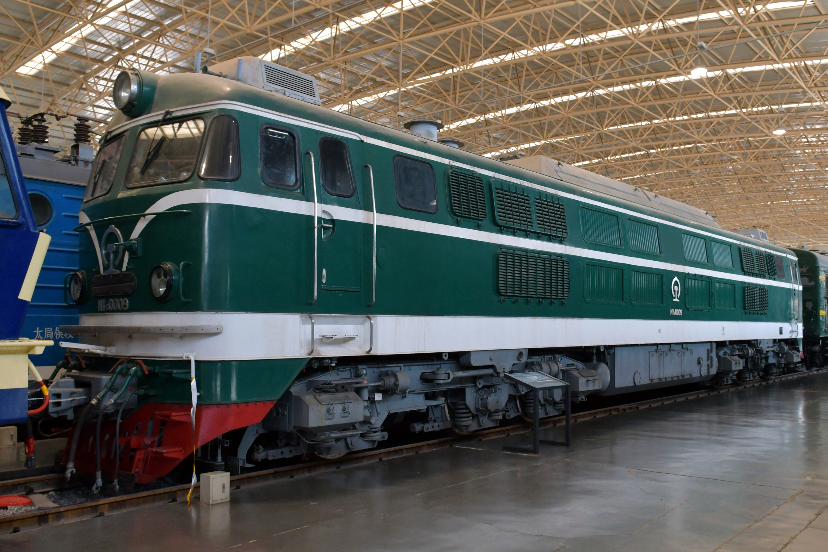 NY6型0009号机车，曾配属铁道部专运处，退役后保存在中国铁道博物馆